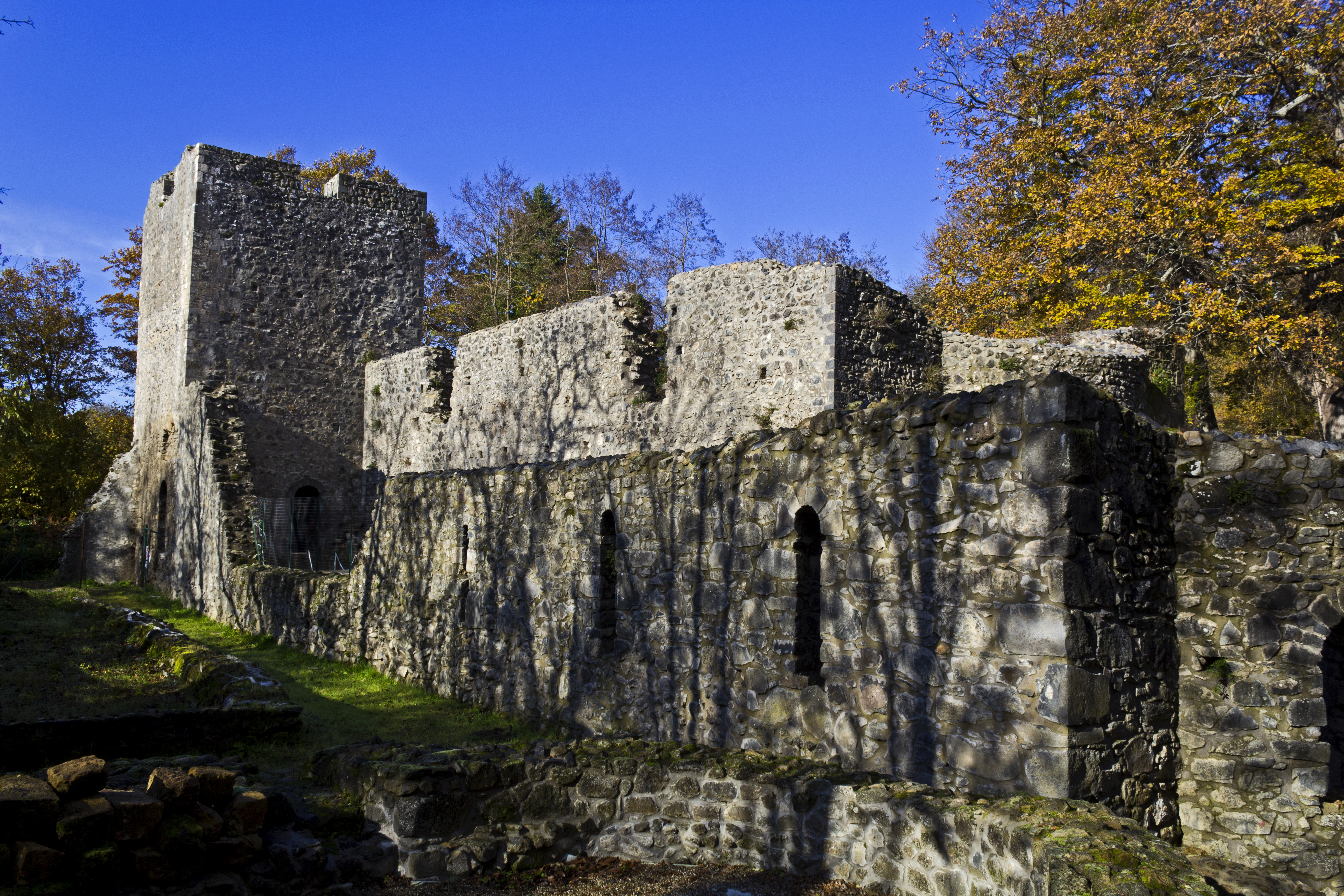 Mura di Abbazia di Sant'Ippolito This is a photo of a monument which is part of cultural heritage of Italy.